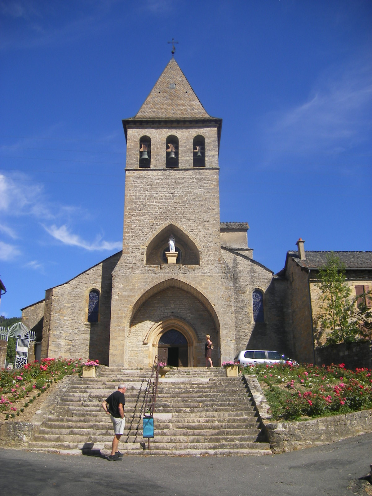 Chanac